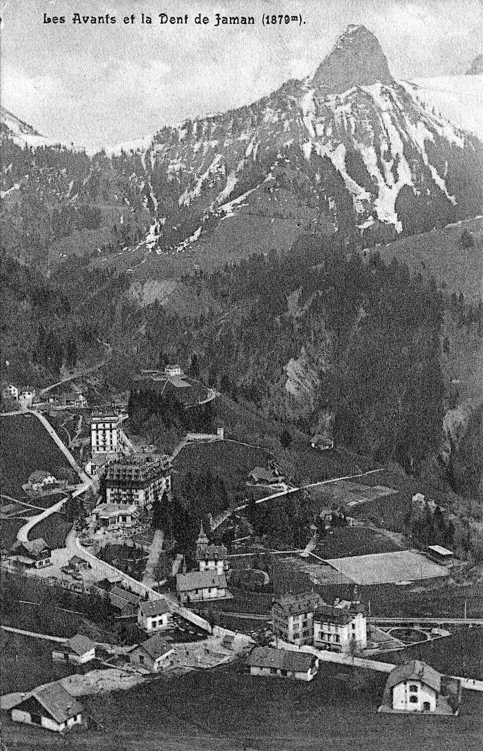 Postkarte von Les-Avants und dem Dent-de-Jaman